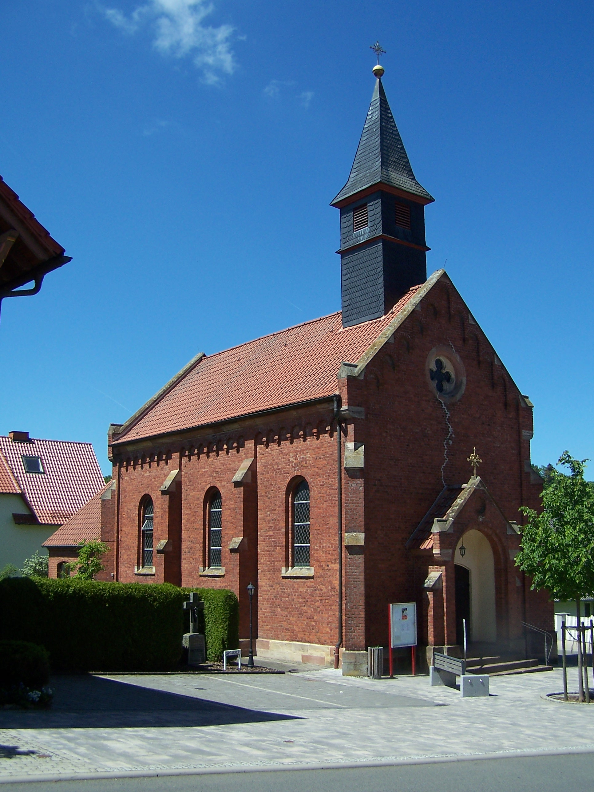 Ansichten und Impressionen aus dem Geisaer Stadtteil Otzbach.